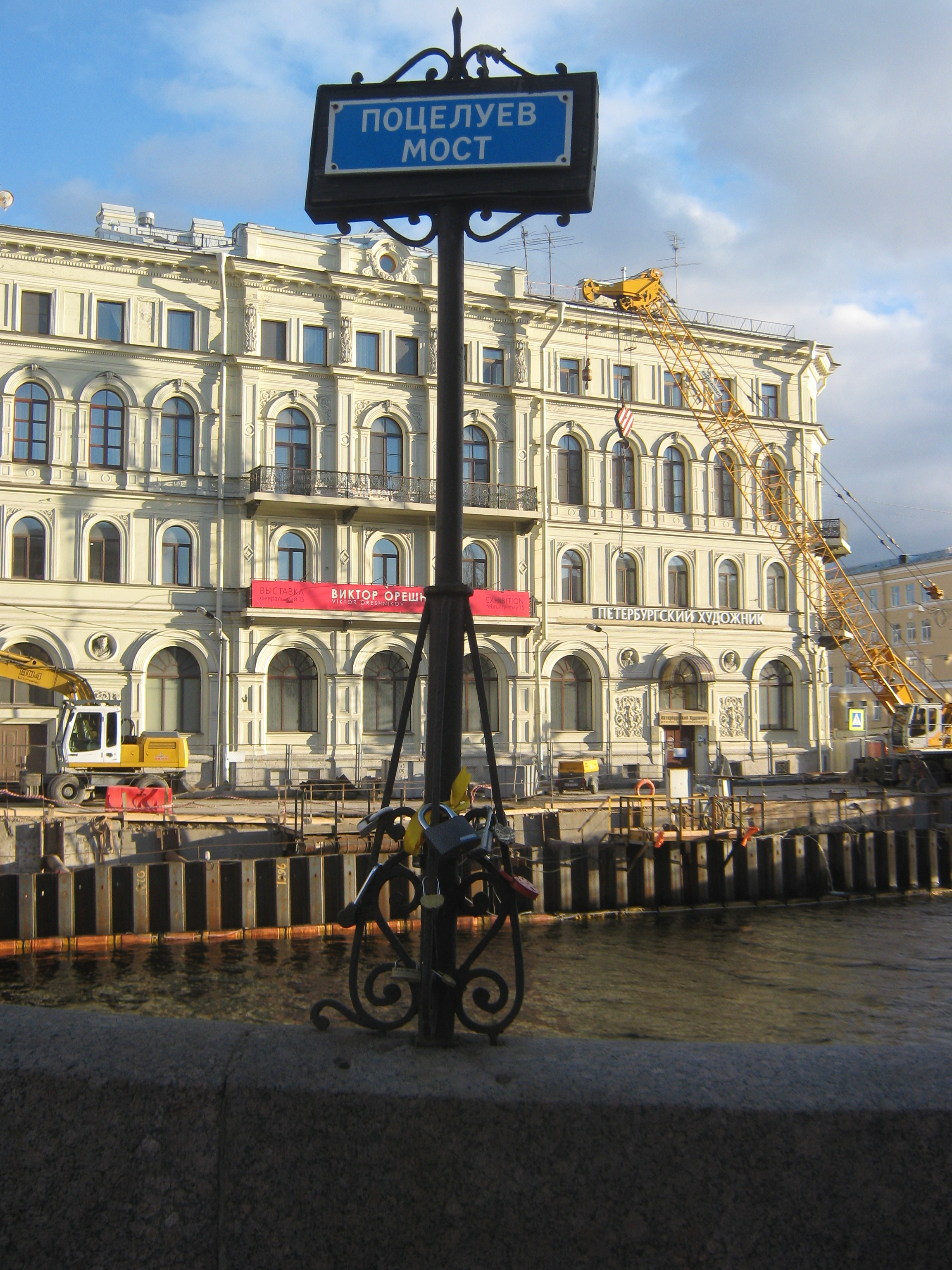 Замки любви перед Поцелуевым мостом (Санкт-Петербург, Россия)